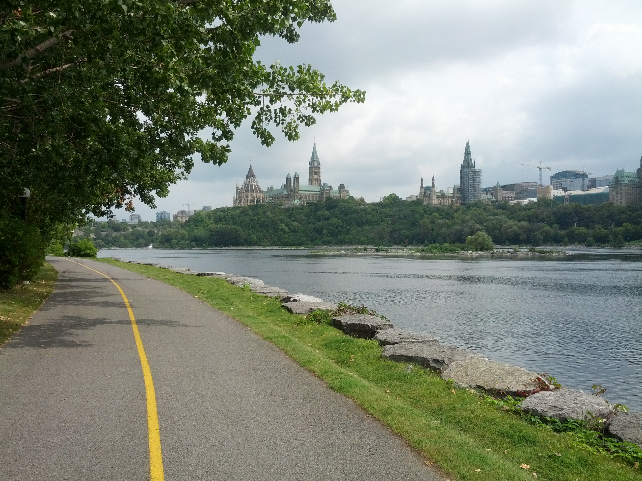 Parlamento visto de Gatineau